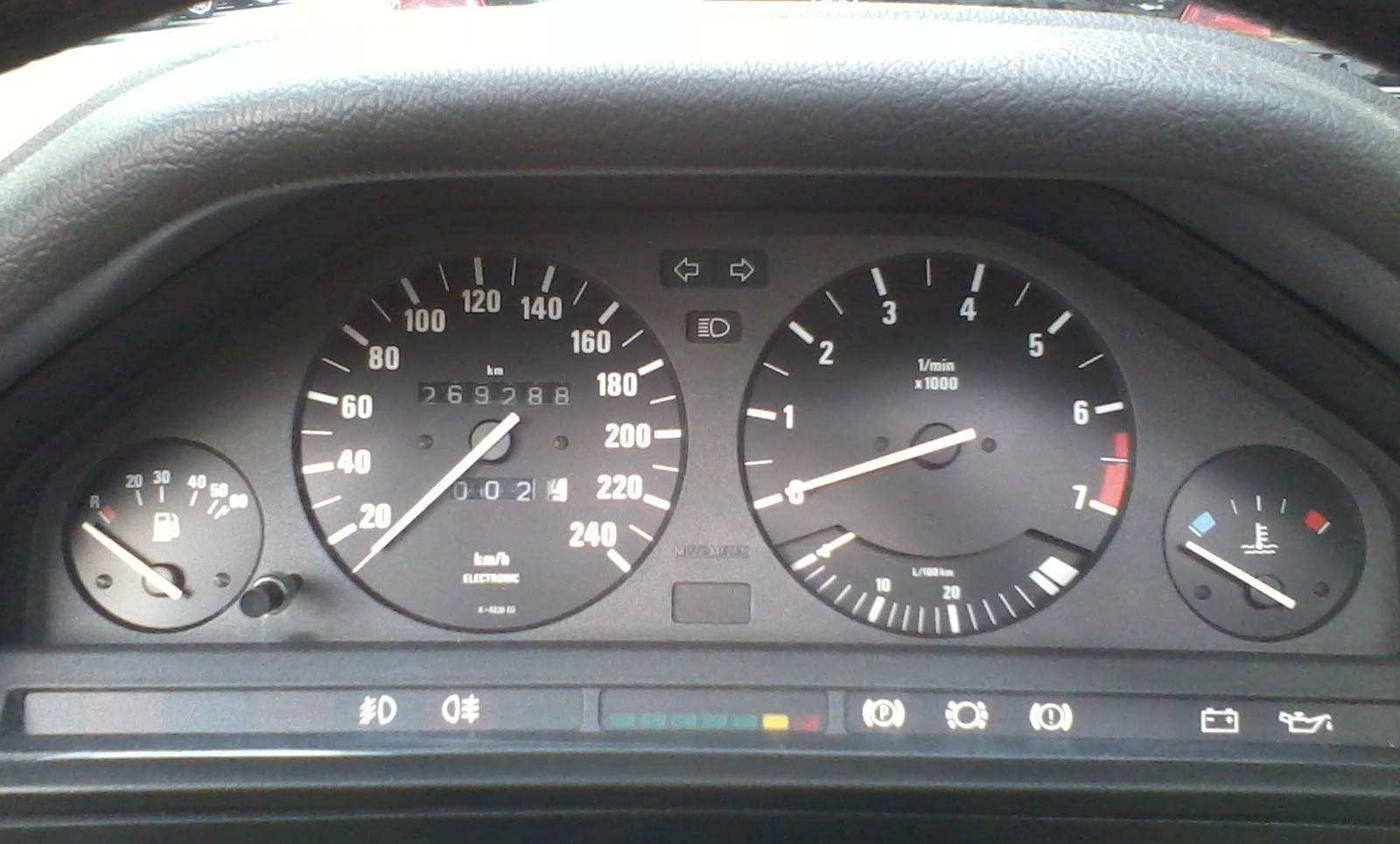 Instrumententafel BMW 320i E30